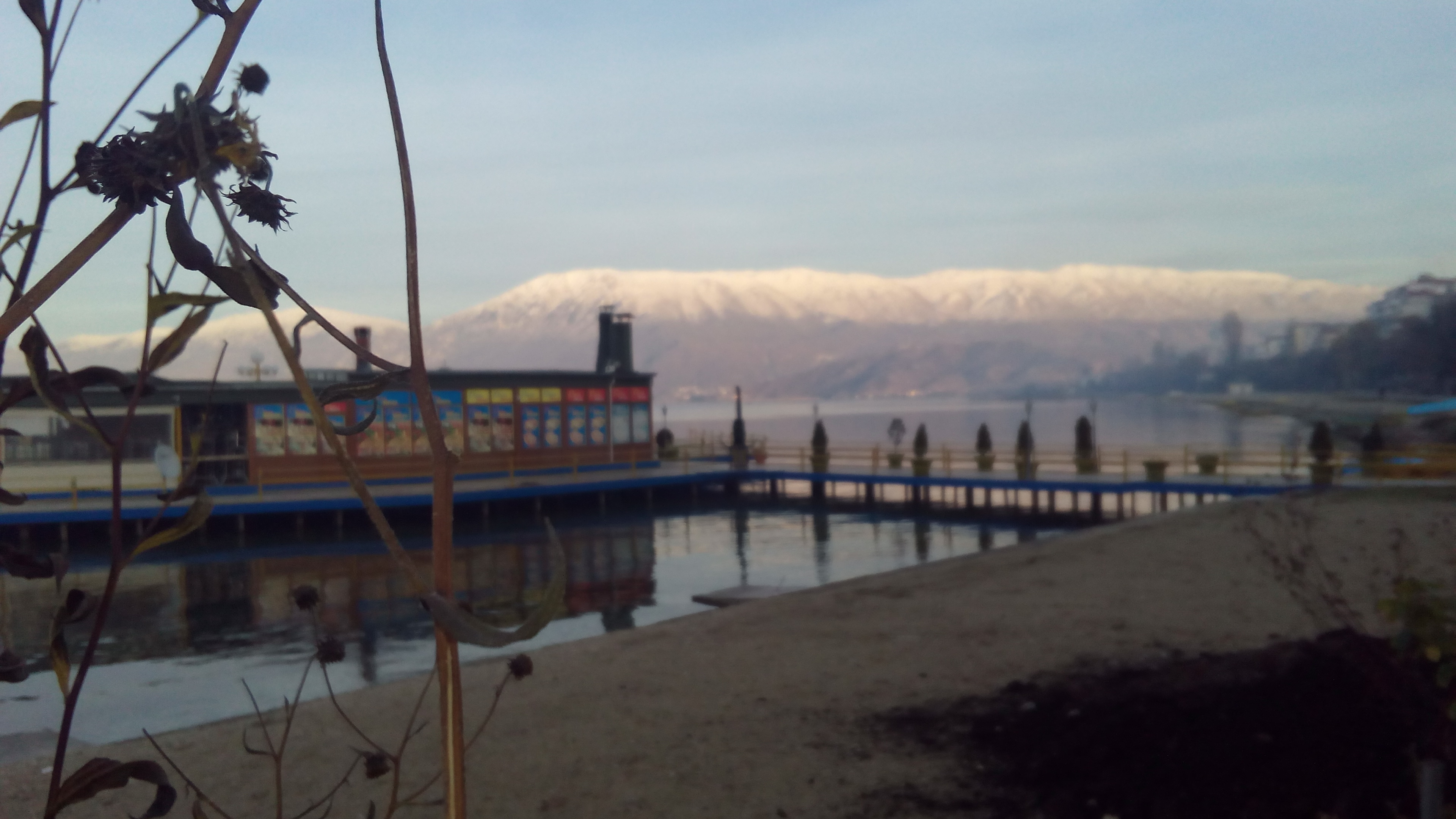 Fotografuar nga b_photography__._